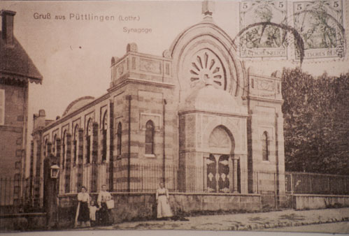 Ehemalige Synagoge in Puttelange-aux-Lacs